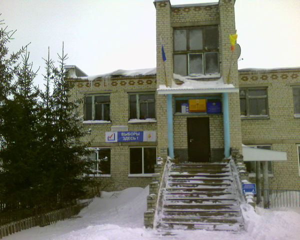 дом культуры